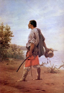 "El baqueano" (oleo) del pintor de Uruguay Juan Manuel Blanes (1830 - 1901).